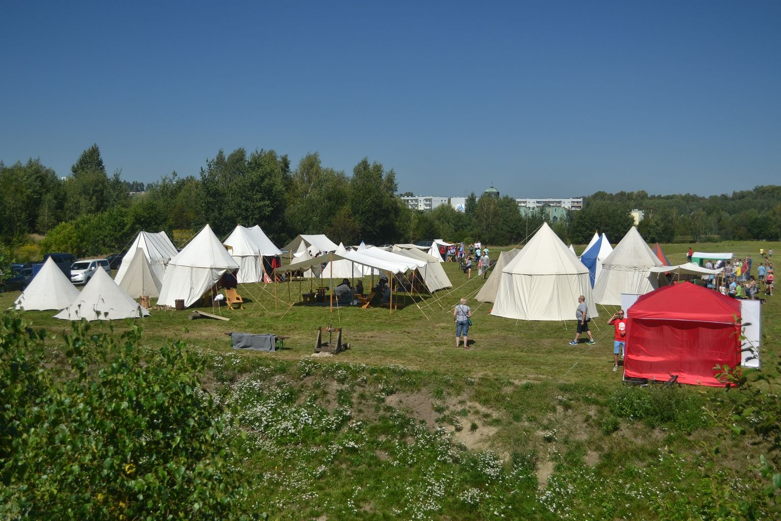 Impreza historyczna na gródku w Kochłowicach 2016